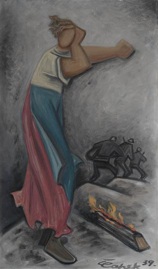 Tvorba Josefa Čapka